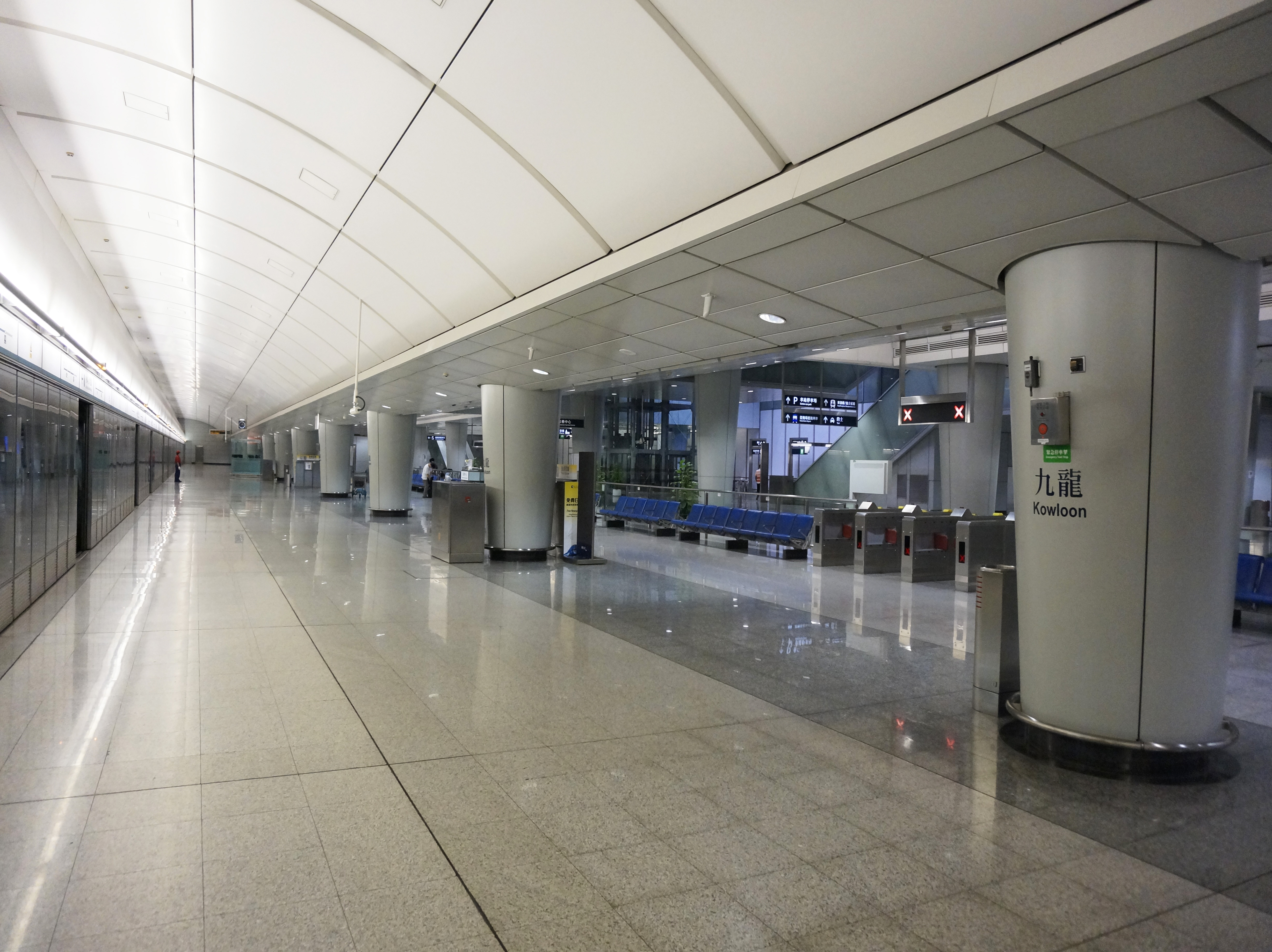 九龍港鐵站月台